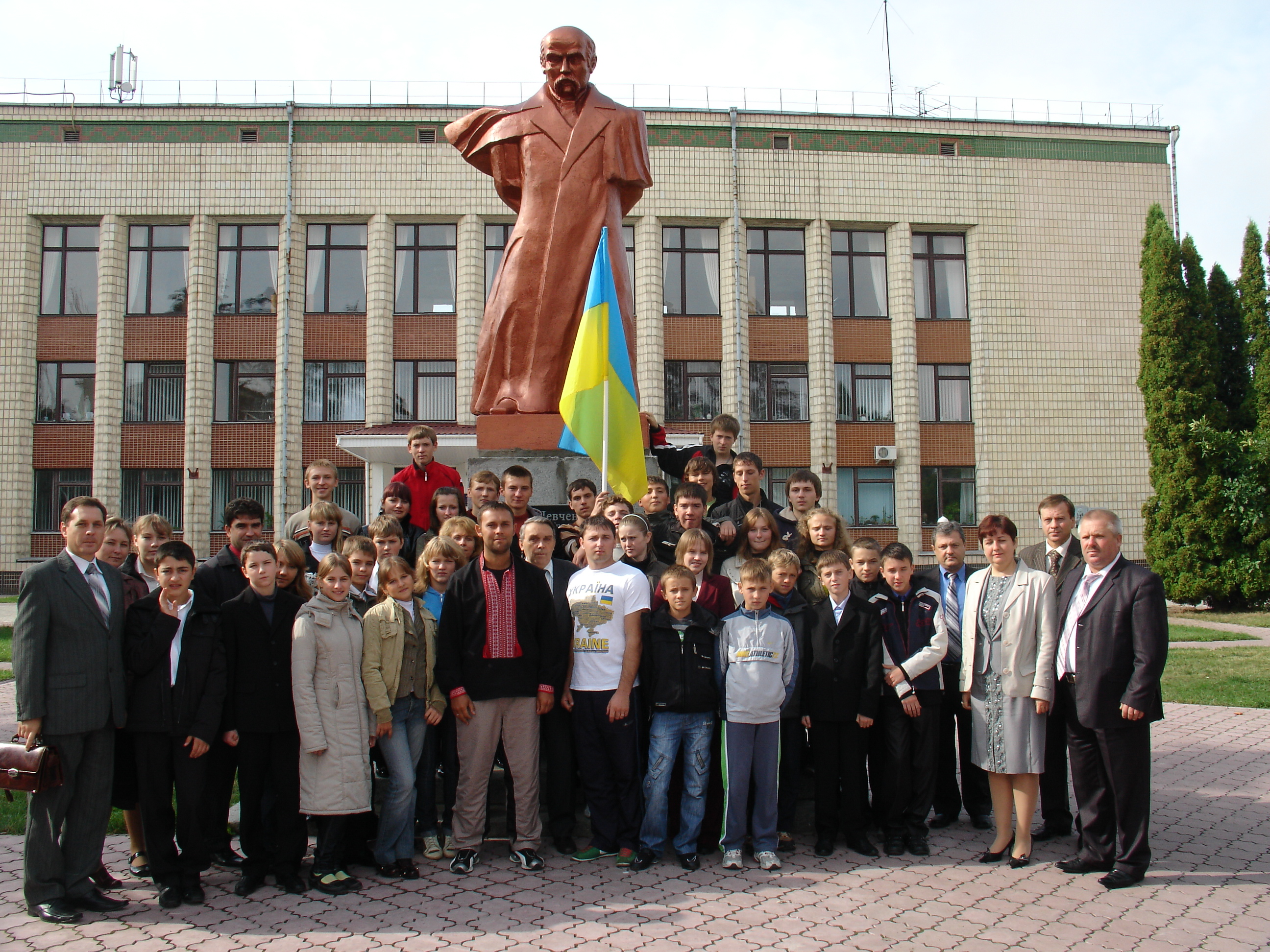 Тарасів дороговказ (2008) - Сквира